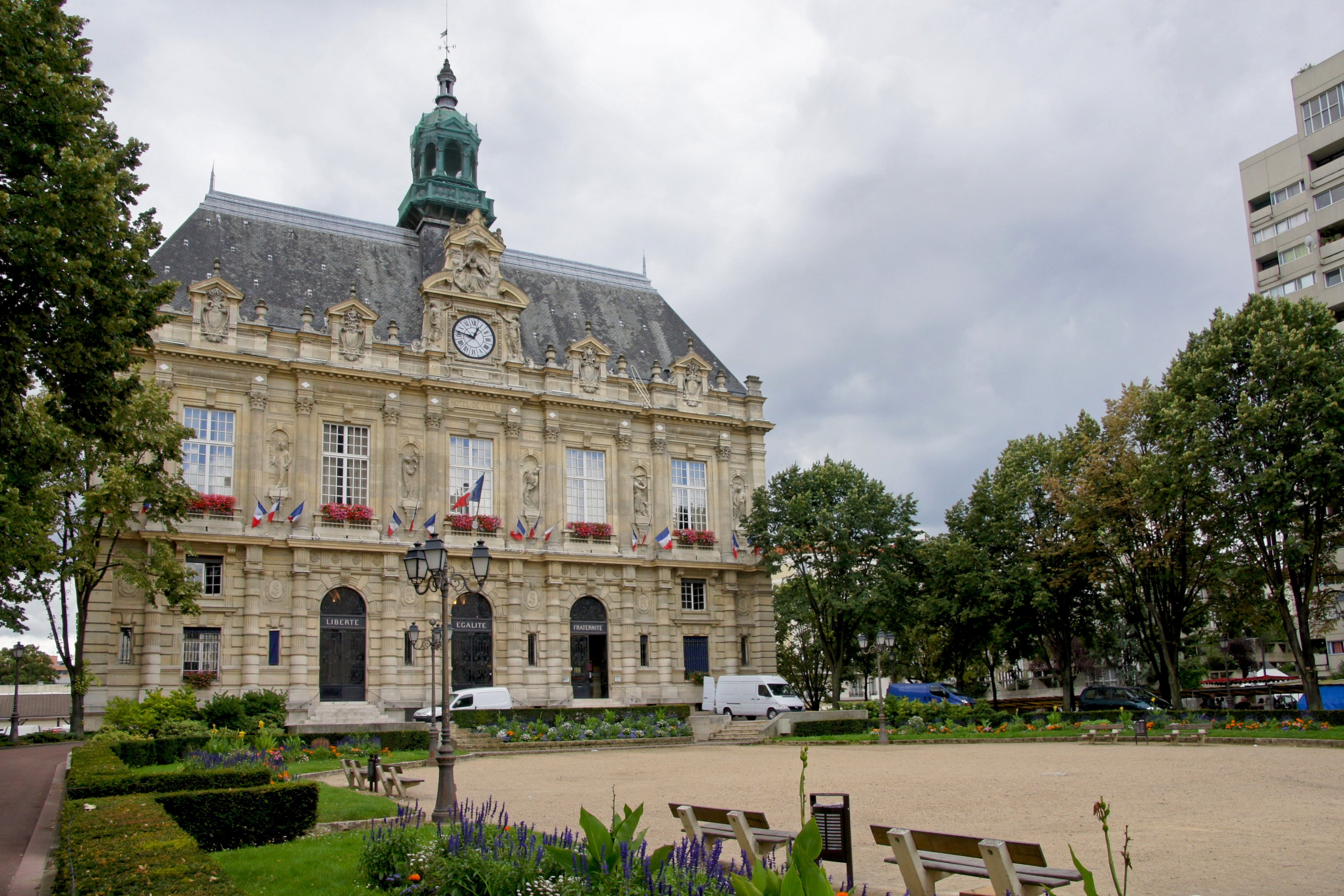 La mairie d'Ivry-sur-Seine (Val-de-Marne, France).